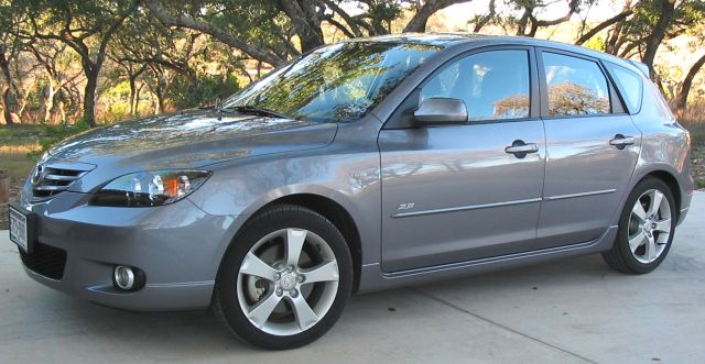 Mazda 3 Sport